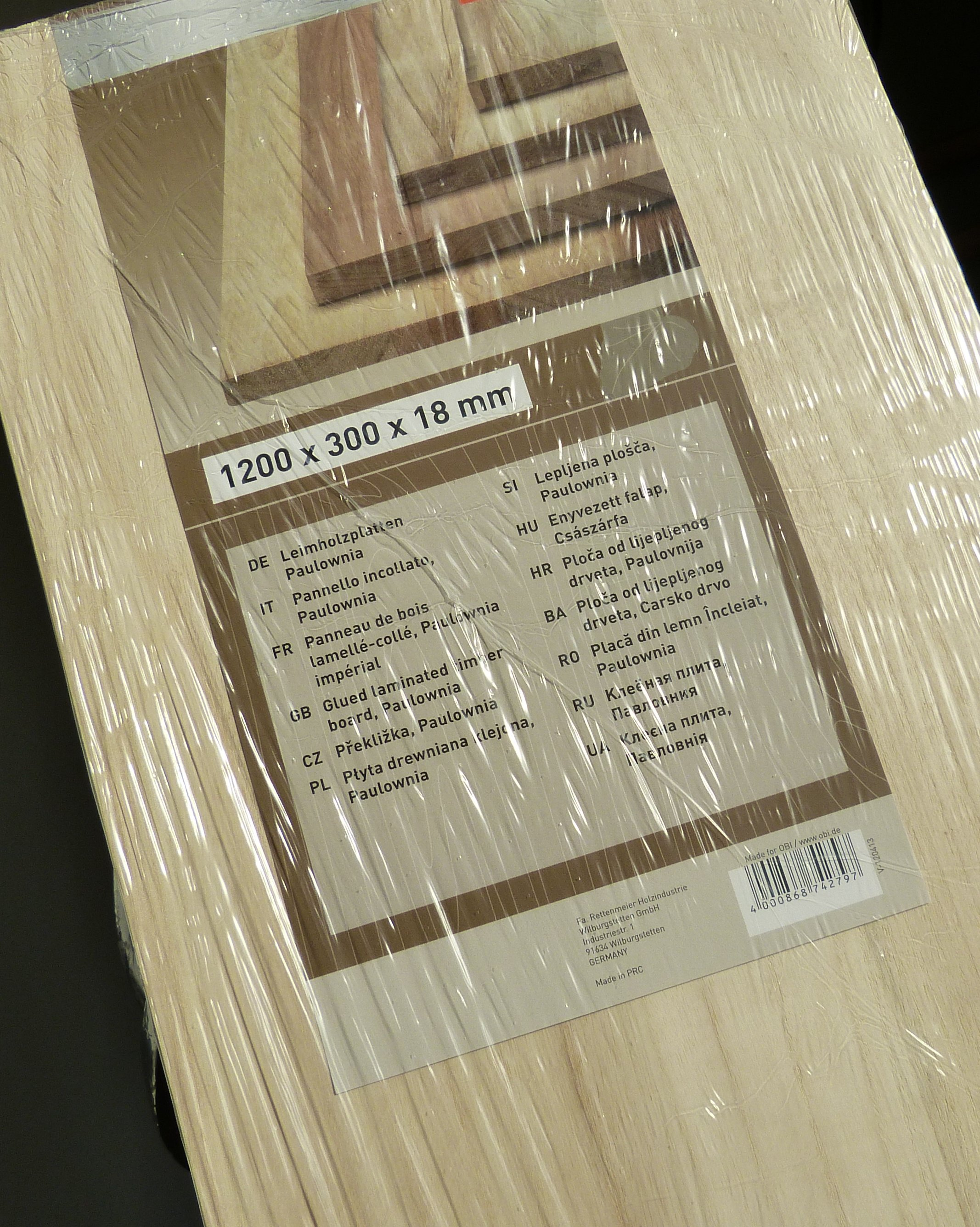 Leimholzplatte Paulownia, produziert in der Volksrepublik China, aus einem deutschen Baumarkt, April 2015